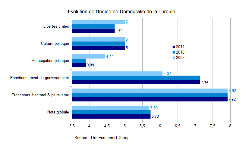 Evolution de l'Indice de Démoncratie de la Turquie entre 2008 et 2011 - source: The Economist Group